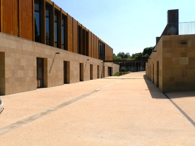 Esterno della nuova Centrale del 118